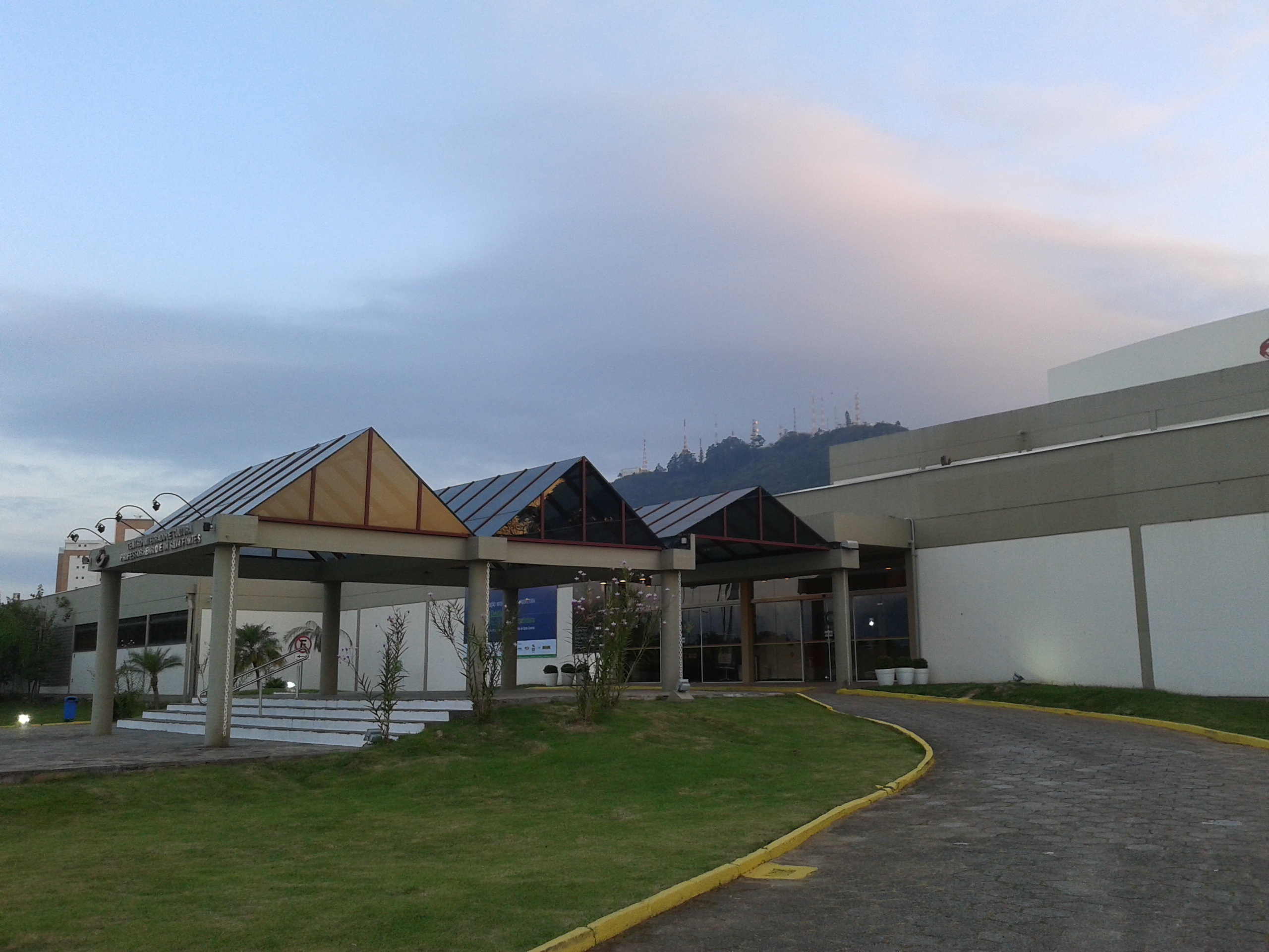 Centro Integrado de Cultura (CIC) em Florianópolis, Brasil.